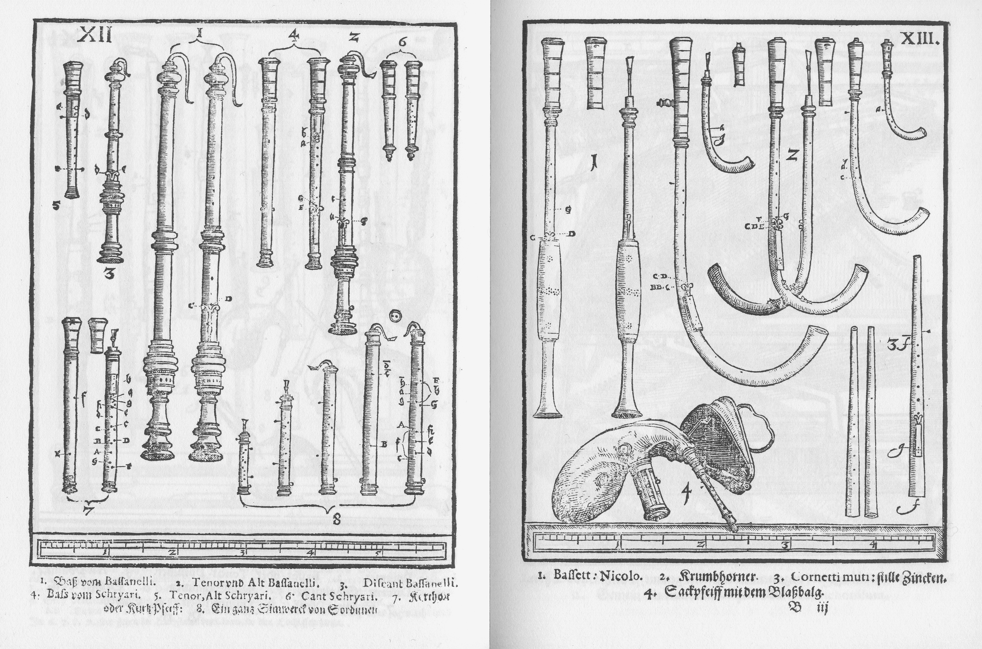 Syntagma Musicum Theatrum Instrumentorum seu Sciagraphia Wolfenbüttel 1620